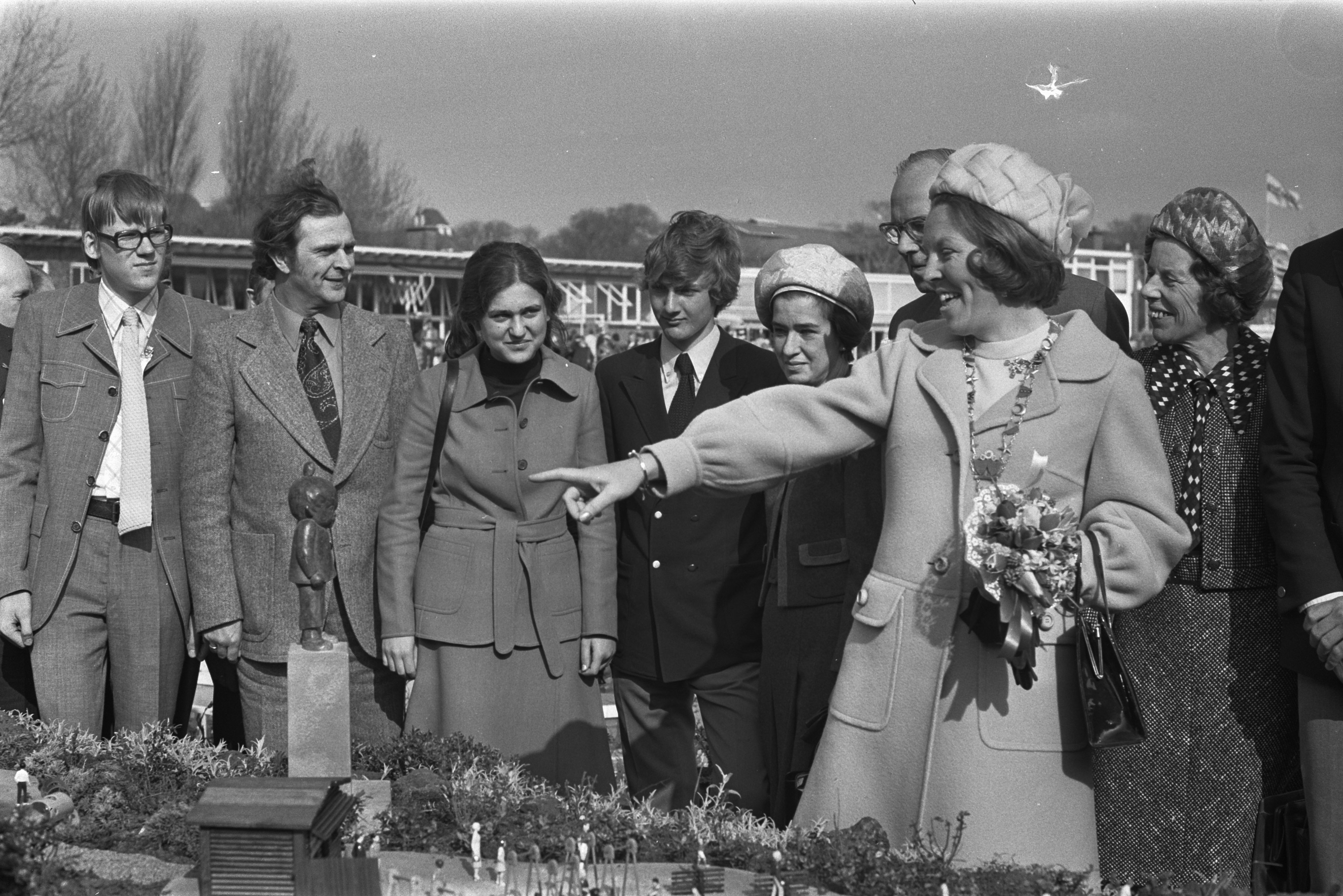 Collectie / Archief : Fotocollectie Anefo Reportage / Serie : [ onbekend ] Beschrijving : Prinses Beatrix onthult Jantje Beton in Madurodam, Beatrix wijst naar Jantje Beton Datum : 25 april 1973 Trefwoorden : onthullingen, prinsessen Persoonsnaam : Beatrix, prinses Fotograaf : Peters, Hans / Anefo Auteursrechthebbende : Nationaal Archief Materiaalsoort : Negatief (zwart/wit) Nummer archiefinventaris : bekijk toegang 2.24.01.05 Bestanddeelnummer : 926-3694